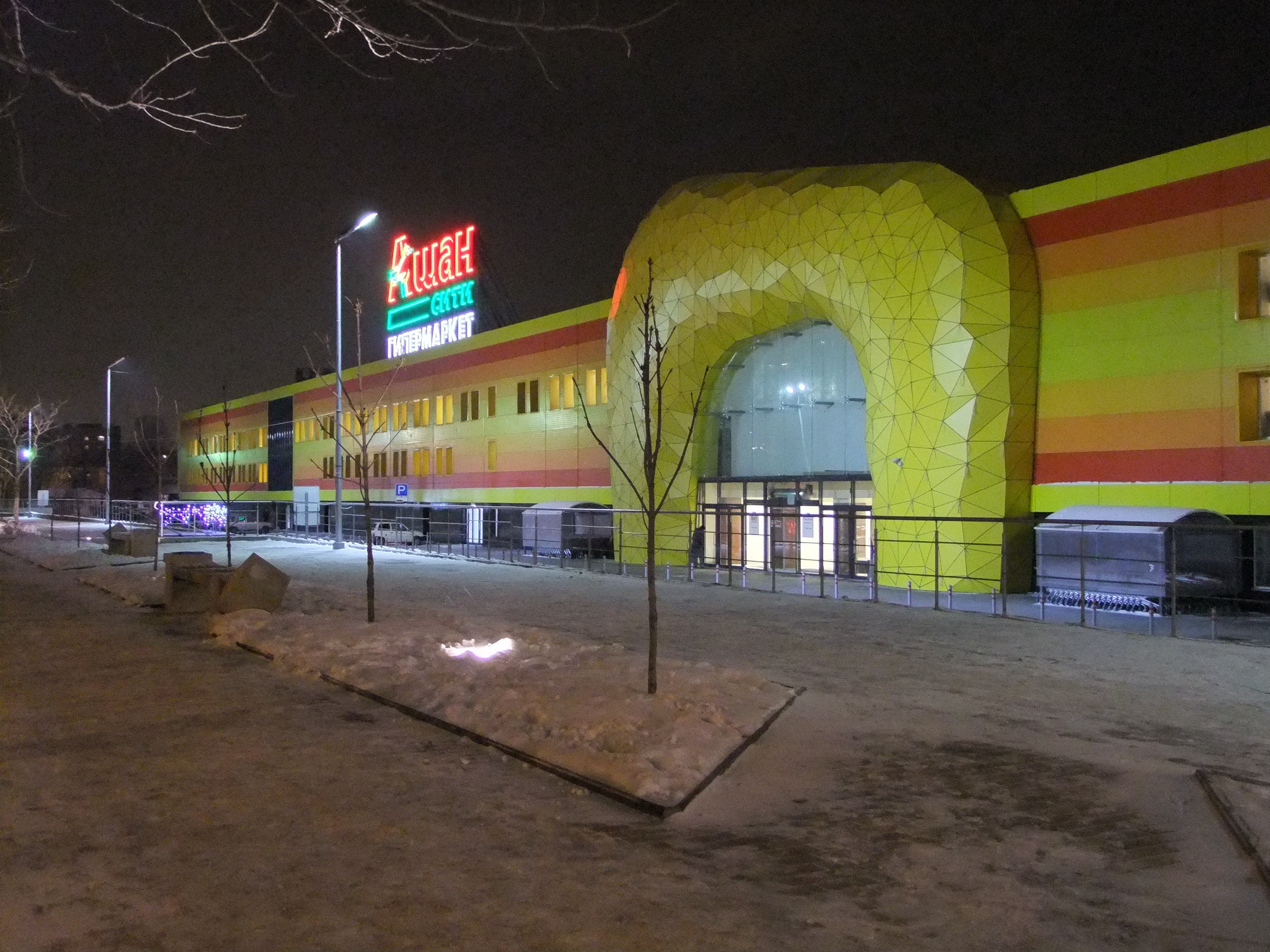 Теперь это гипермаркет Оранжевый